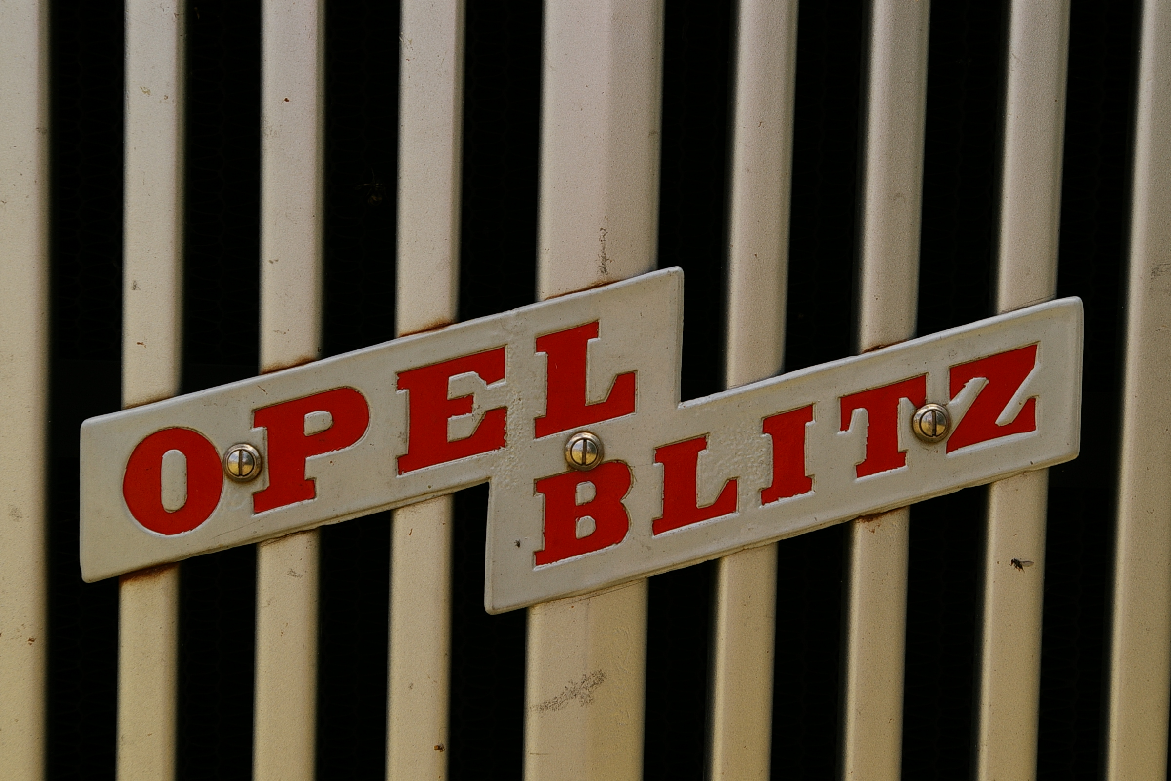 Kühleremblem des LKW Opel Blitz